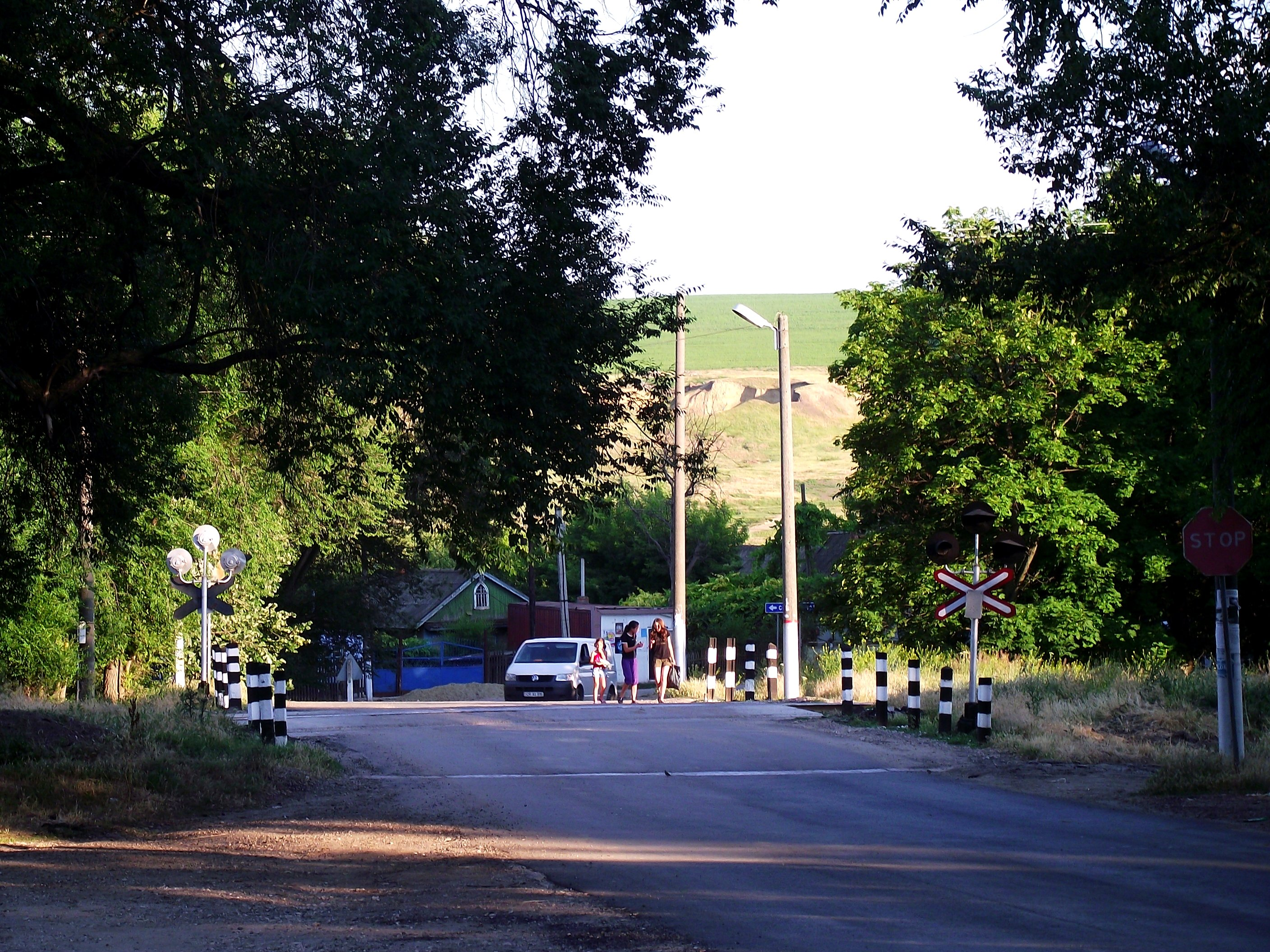 R47, Iargara, Moldova